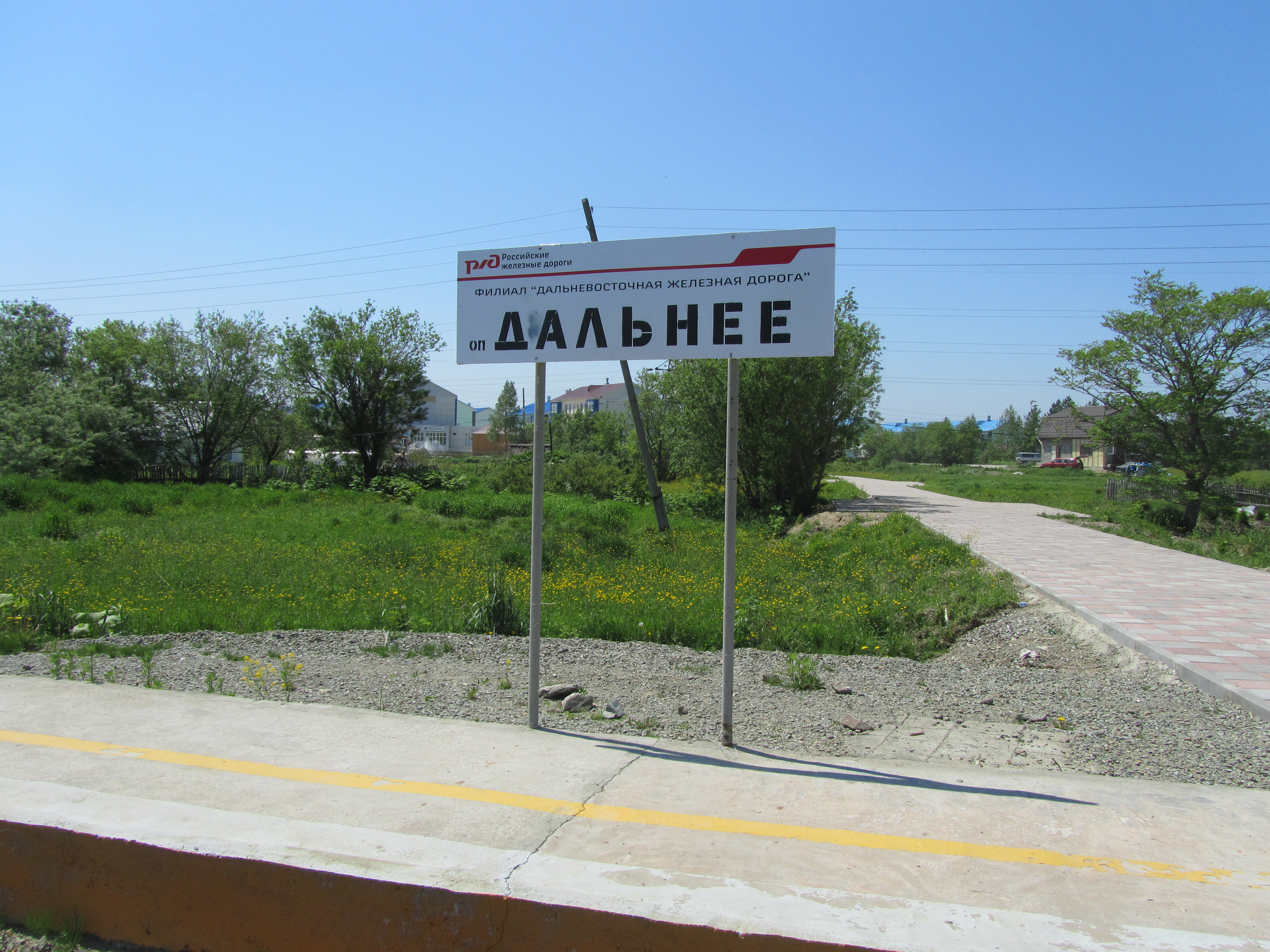 Платформа Дальнее Сахалинского региона ДВЖД